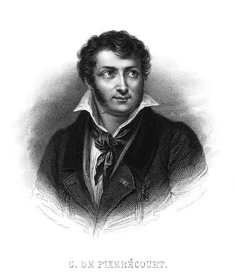 portrait de Guilbert de Pixerécourt (frontispice)